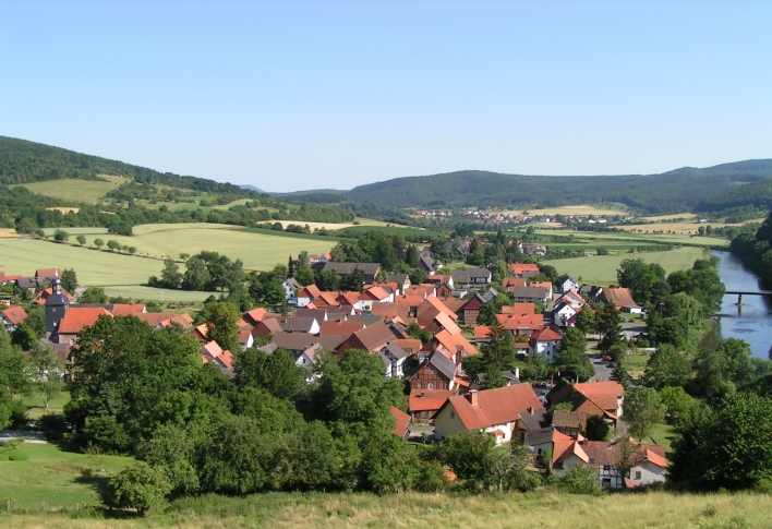 Werleshausen an der Werra, ein Stadtteil von Witzenhausen in Nordhessen. Im Hintergrund das Dorf Oberrieden.